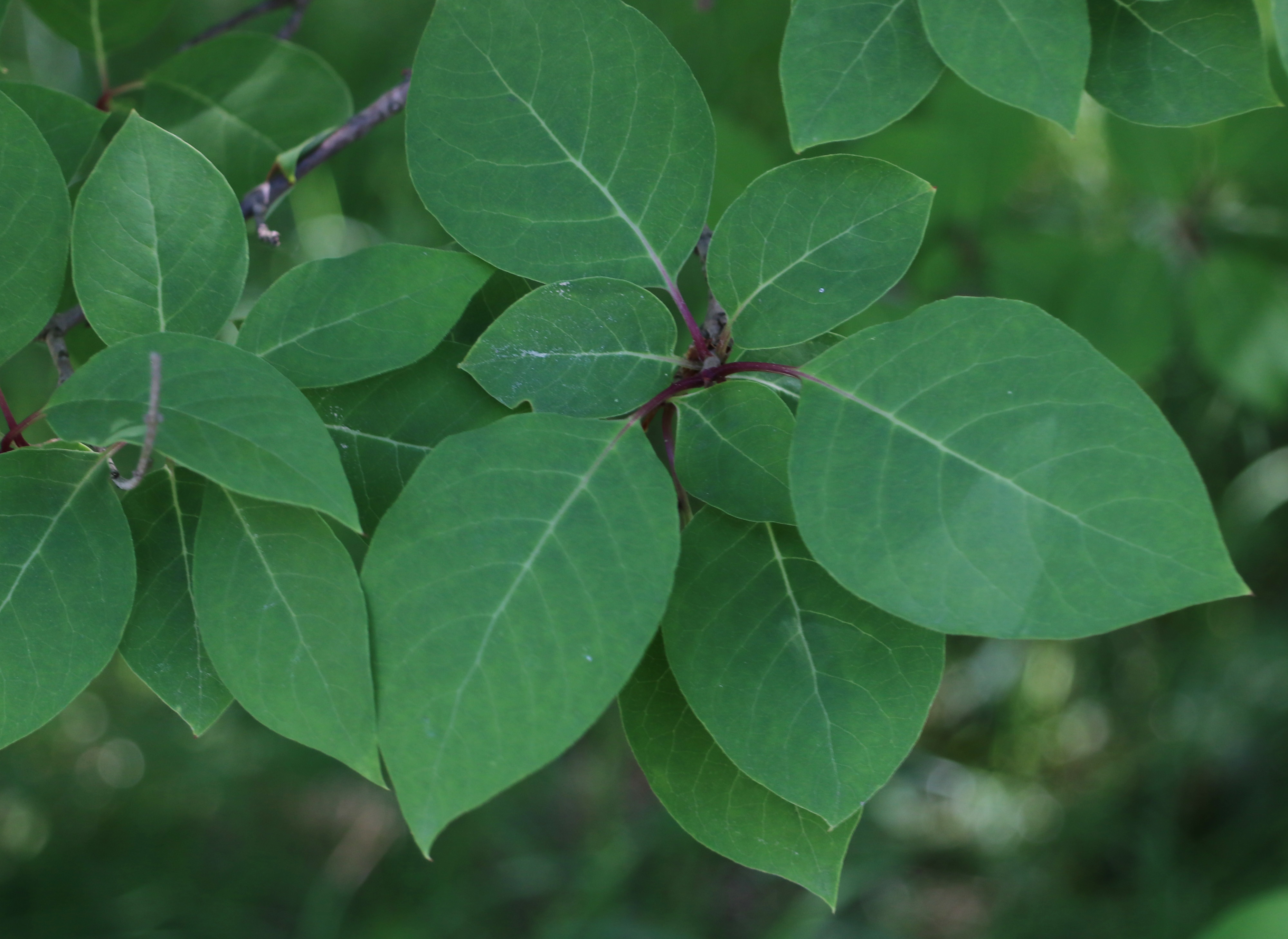 Syringa emodi im Botanischen Garten Dresden